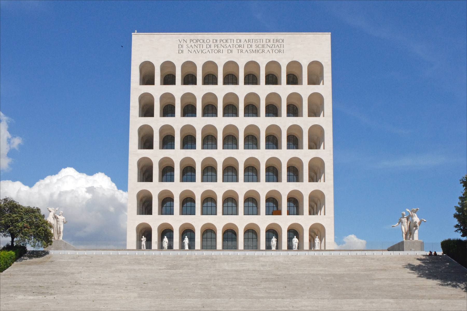 Le palais de la civilisation du travail Commencé en 1938 par Giovanni Guerrini, Ernesto Bruno La Padula et Mario Romano, ce bâtiment est le plus célèbre de l'EUR. Il comprend 6 étages d'arcatures ornées de sculptures (arts et activités) et domine le Tibre au sommet d'un escalier monumental. Quatre groupes sculptés délimitent le périmètre de l'édifice. Il vient de faire l'objet d'une rénovation pour en faire un centre ouvert au public. _____________ La création du nouveau quartier de Rome, appelé EUR : Esposizione Universale di Roma, a été décidée en 1936 par Benito Mussolini (1883-1945) pour célébrer le 20ème anniversaire de la marche sur Rome par une Exposition Universelle qui devait se tenir en 1942. Quelques bâtiments ont été construits mais les travaux d'aménagement et de construction ont été stoppés par la guerre. Les architectes chargés du projet étaient : Marcello Piacentini entouré de Giuseppe Pagano, Luigi Piccinato, Ettore Rossi, Luigi Vietti. Les travaux ont repris en 1951 avec l'ambition de faire de l'EUR un quartier d'affaires associé à une zone urbaine d'habitation reliée par le métro à Rome et par le train à Ostie.